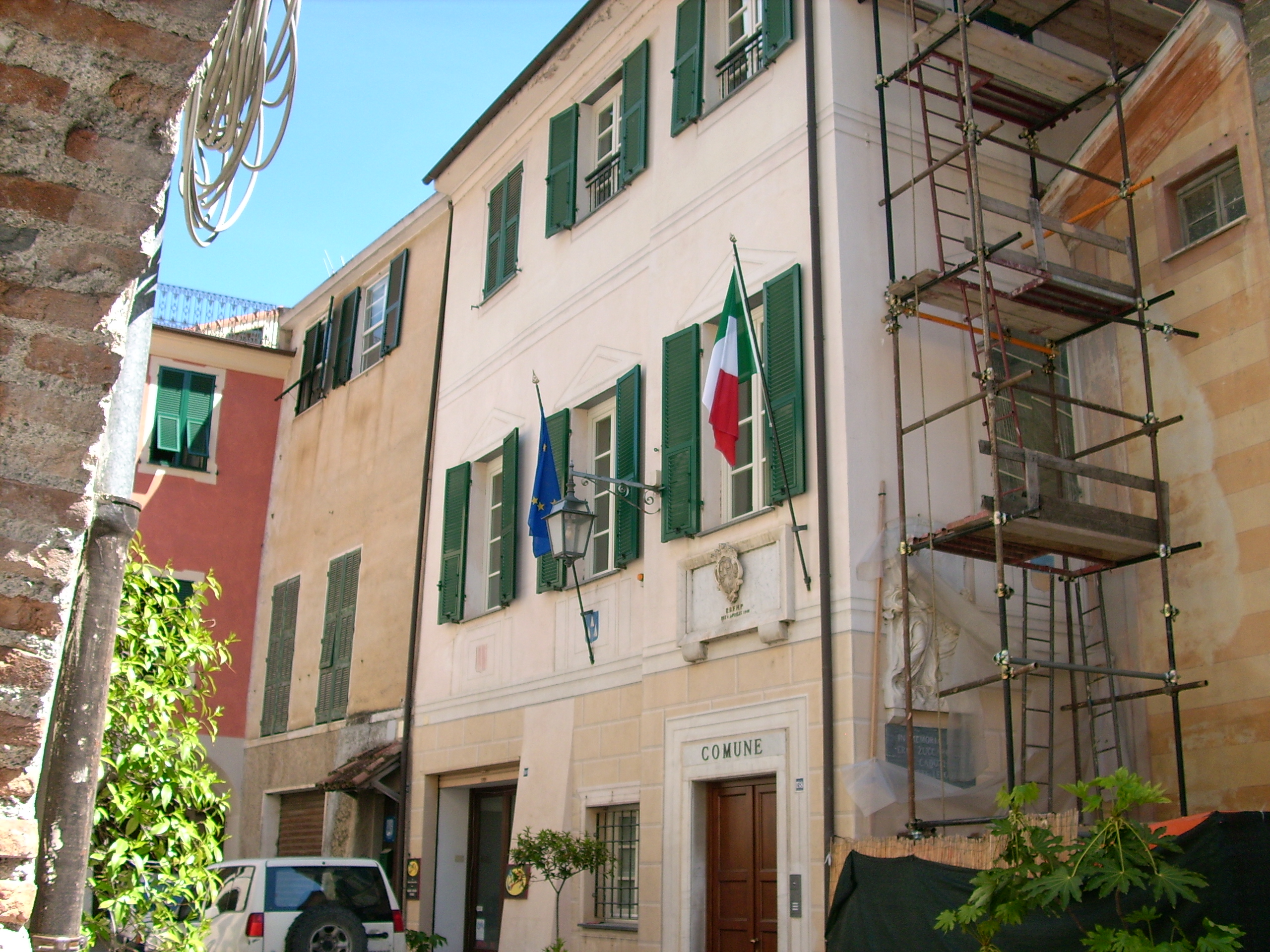 Palazzo Municipale di Zuccarello, Liguria, Italia